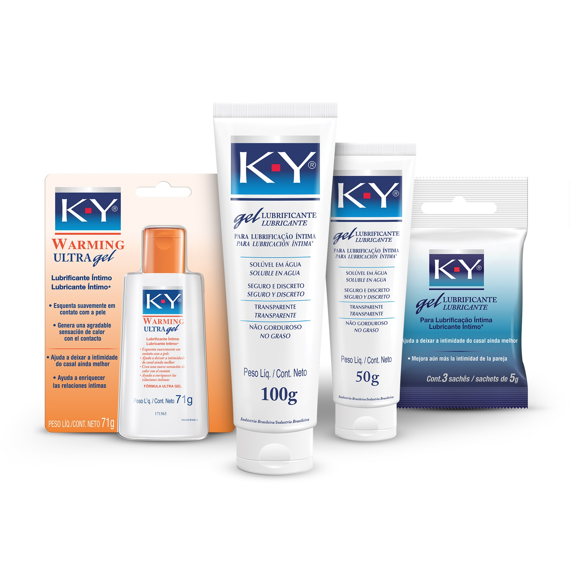 KY lubrificantes íntimos. Marca líder mundial.